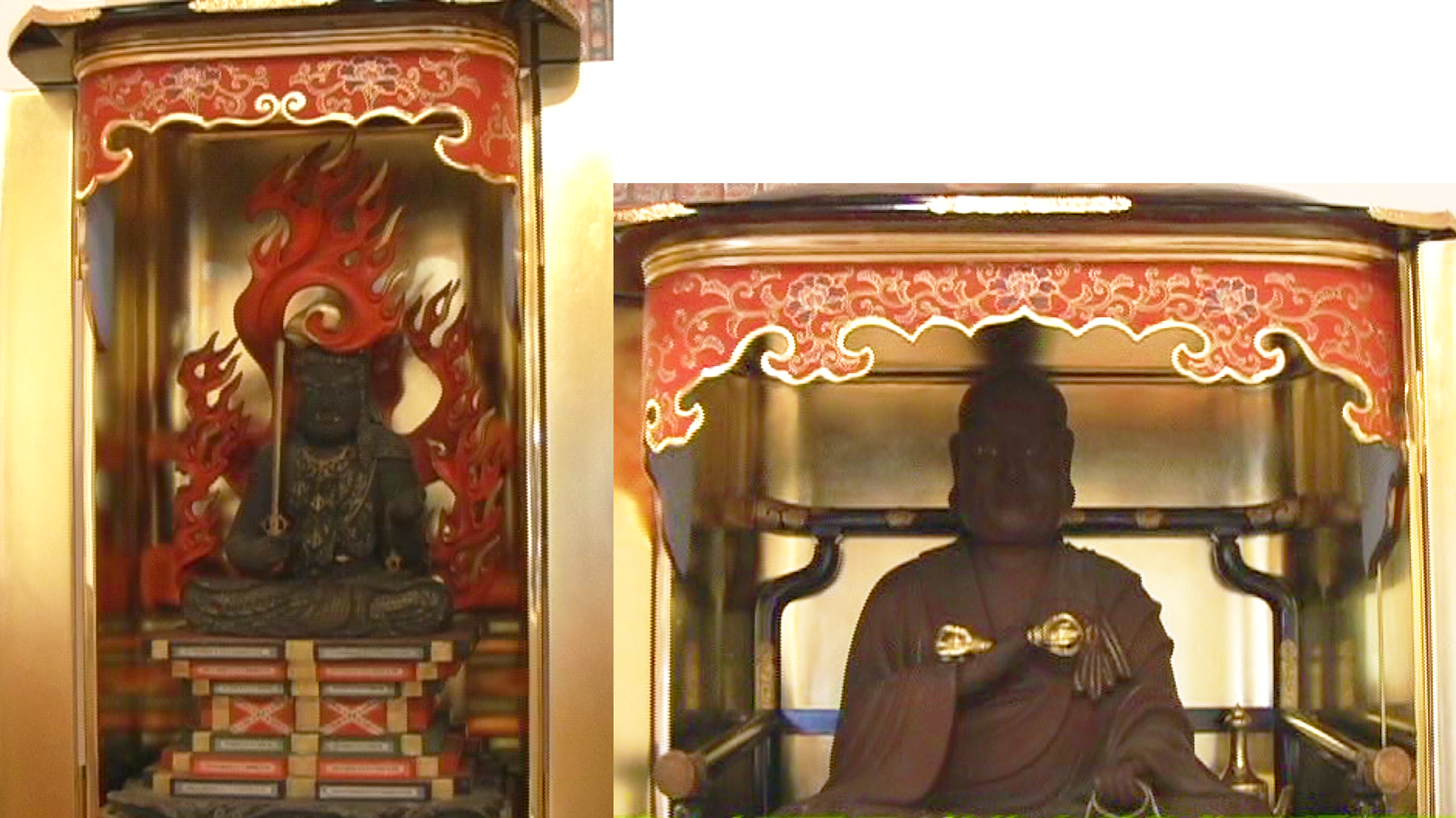 千福寺 本尊両脇佛